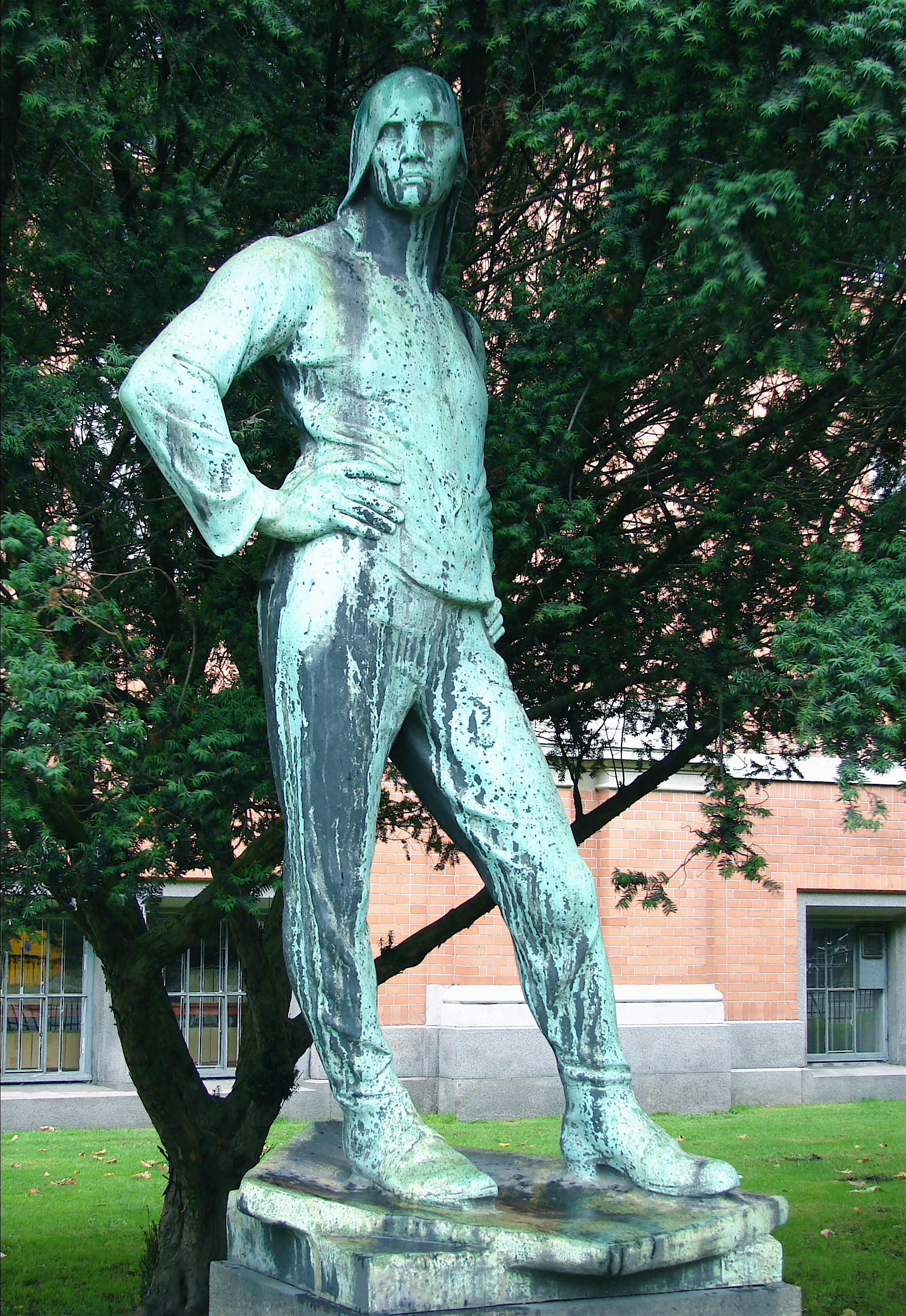 Havnearbejder, Constantin Meunier, 1893, Glyptoteket, København